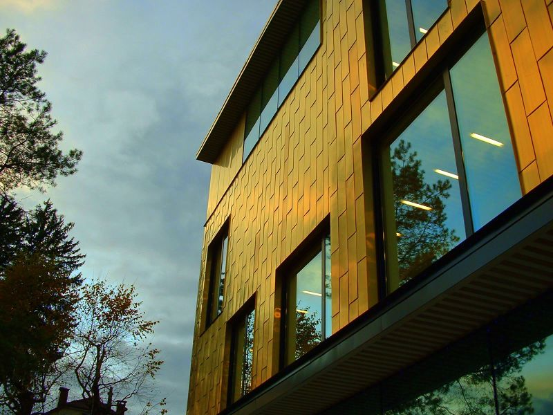 Façade du Musée donnant côté rivière